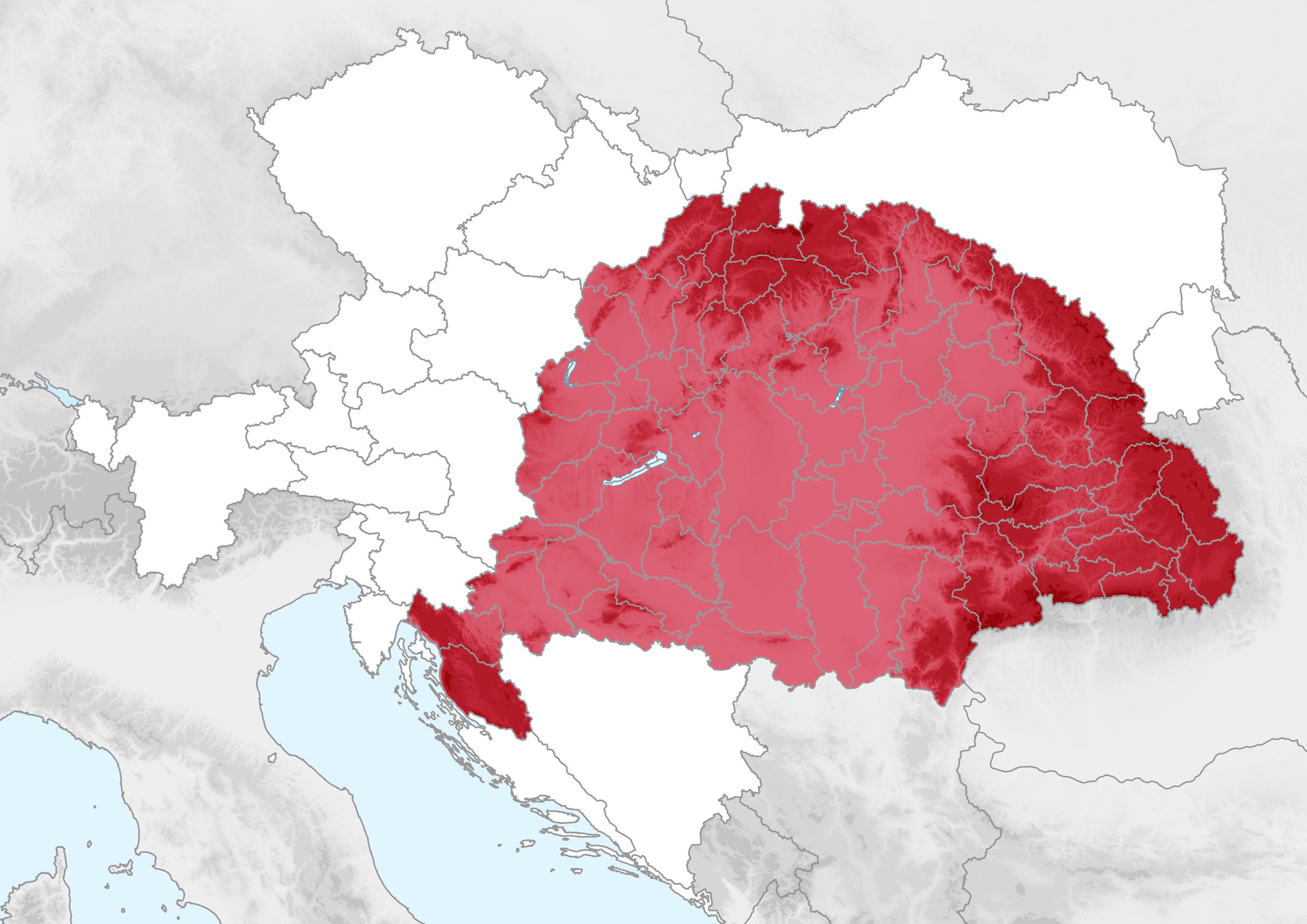 Cartes des Pays de la Couronne de saint Étienne en Autriche-Hongrie